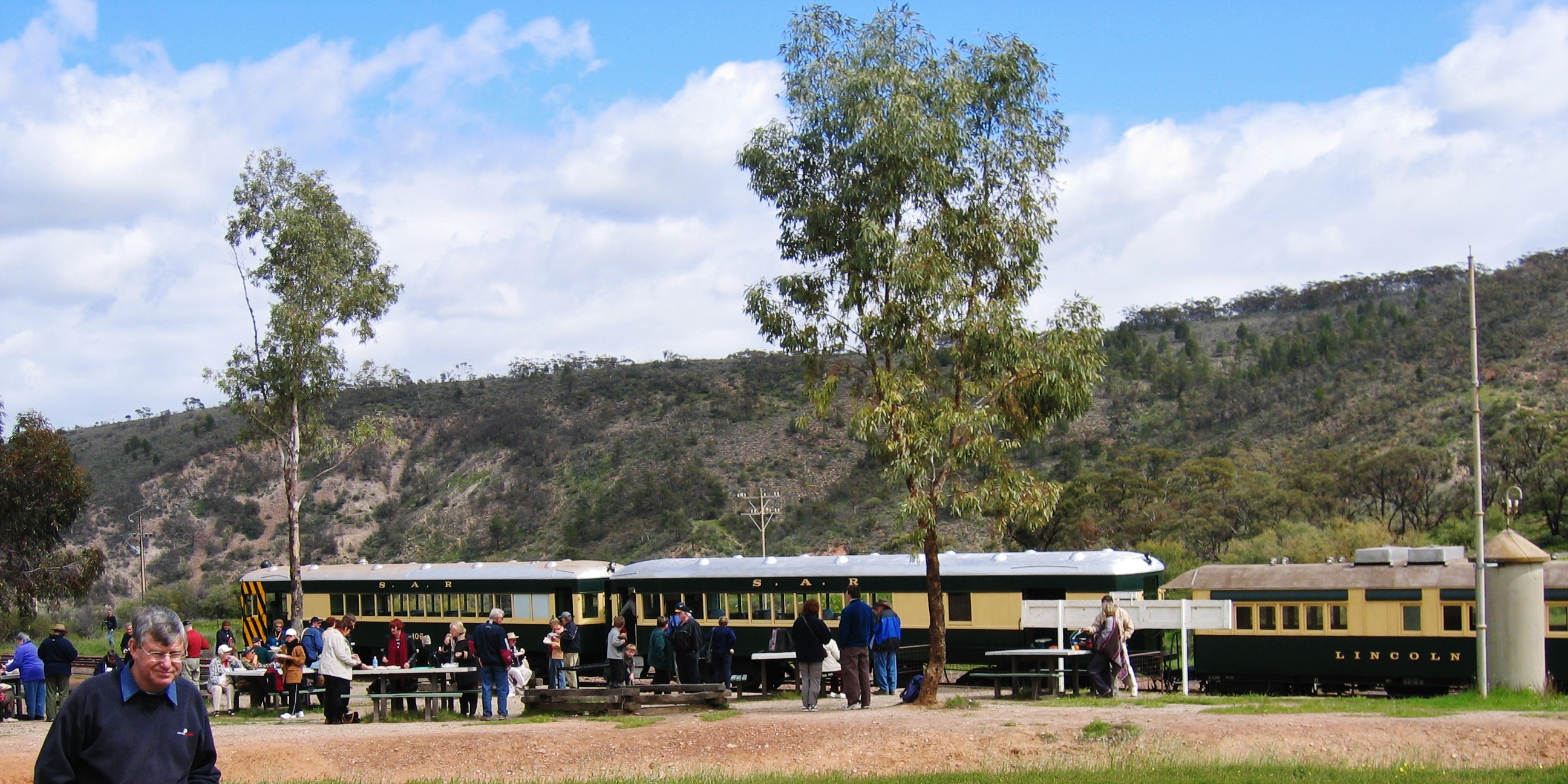 Pichi Richi Railway